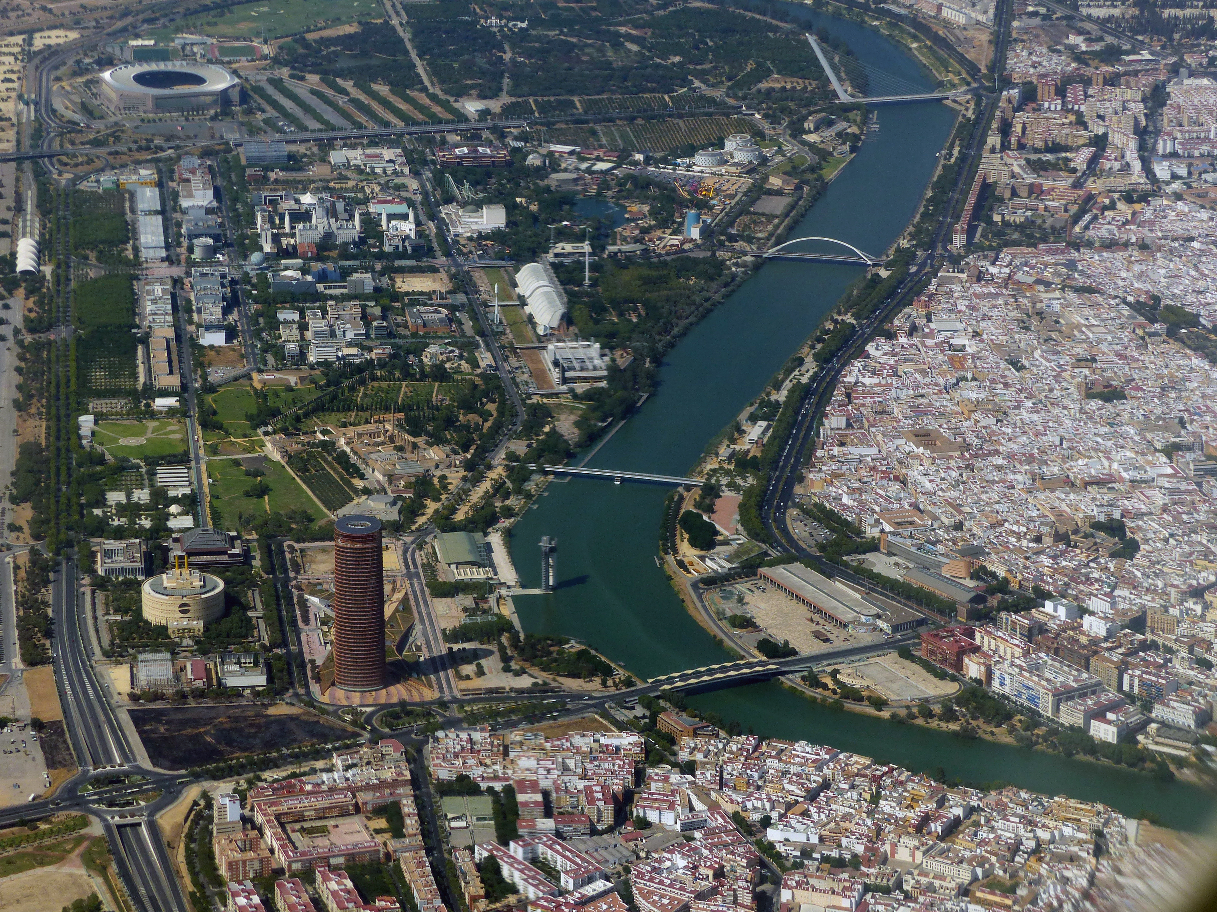 Guadalquivir en Sevilla, puentes, Sevilla, España, 2015